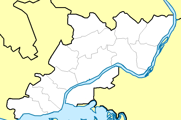 Каракулінський район